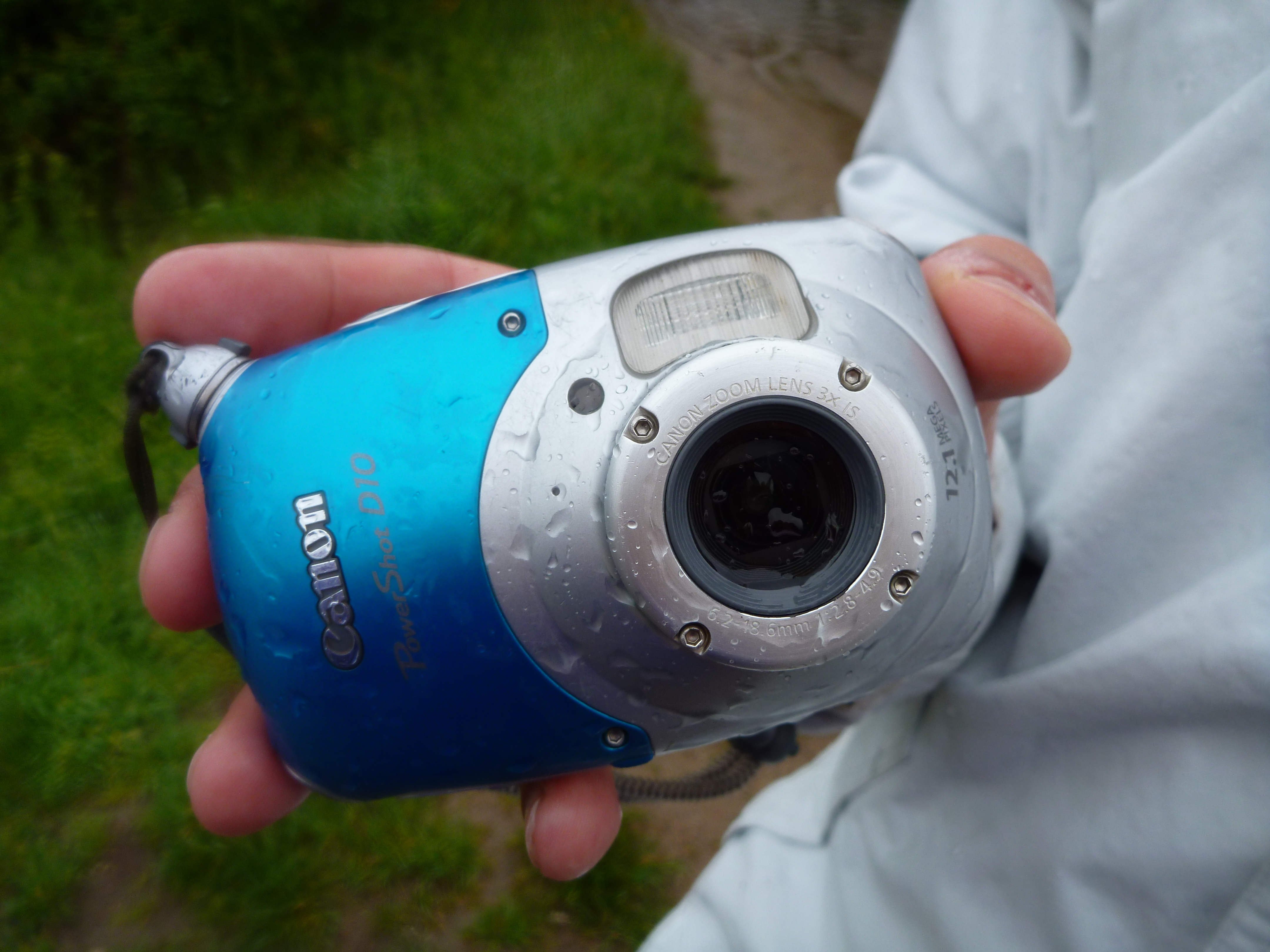 Canon PowerShot D10 pris par un Lumix FT2